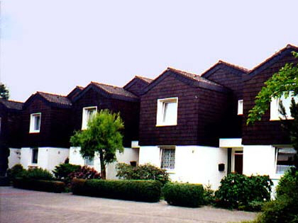 „Helgolandhäuser“ in der III. Nachbarschaft in der Weststadt, Braunschweig